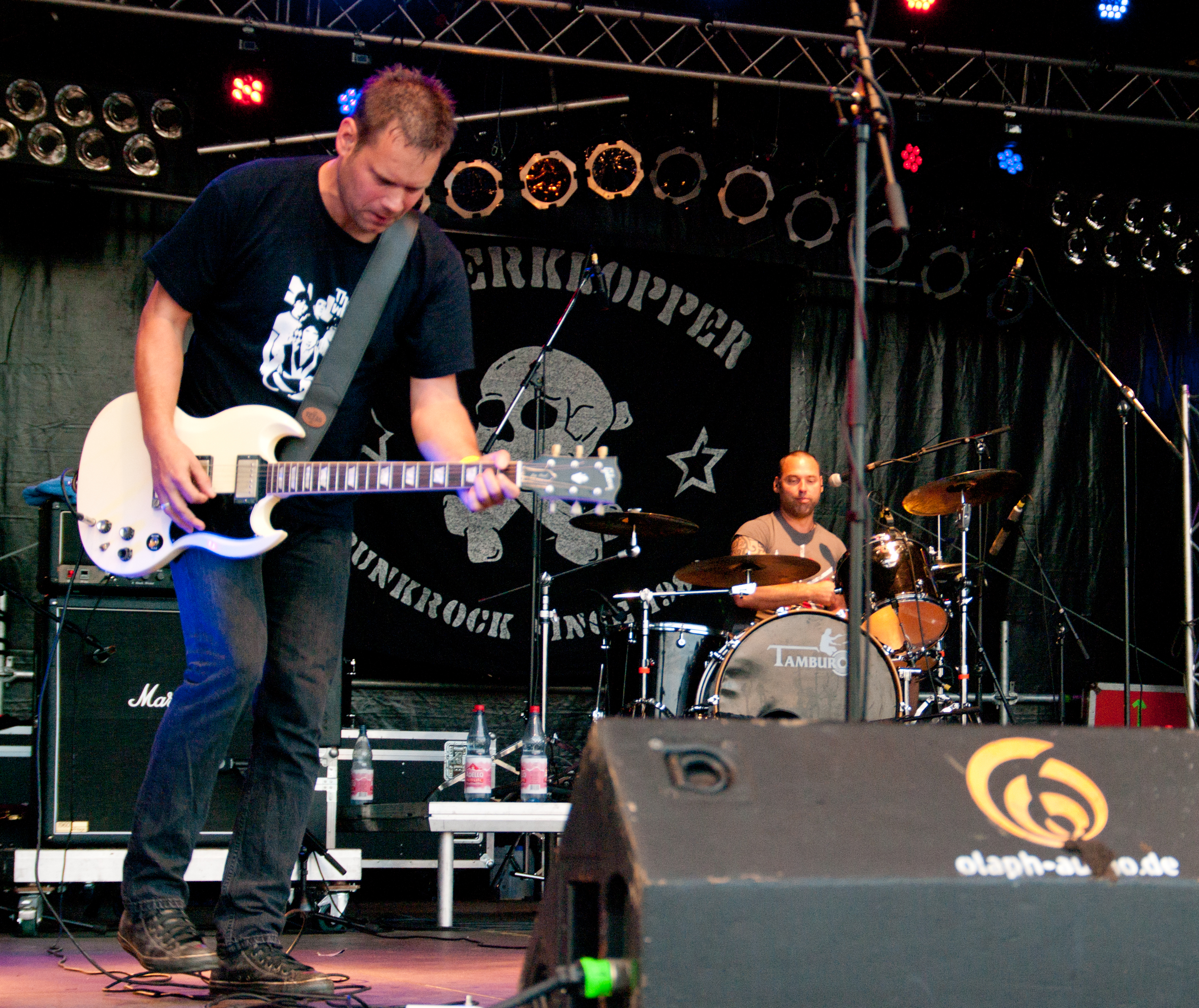 Popperklopper beim Resist to Exist Festival 2017